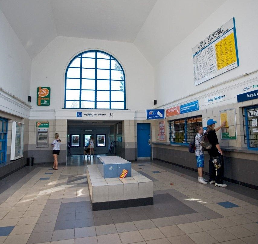 Hol dworca zaskakująco mały, jak na rozmiary budynku. Mieści poczekalnię, kasy itp.